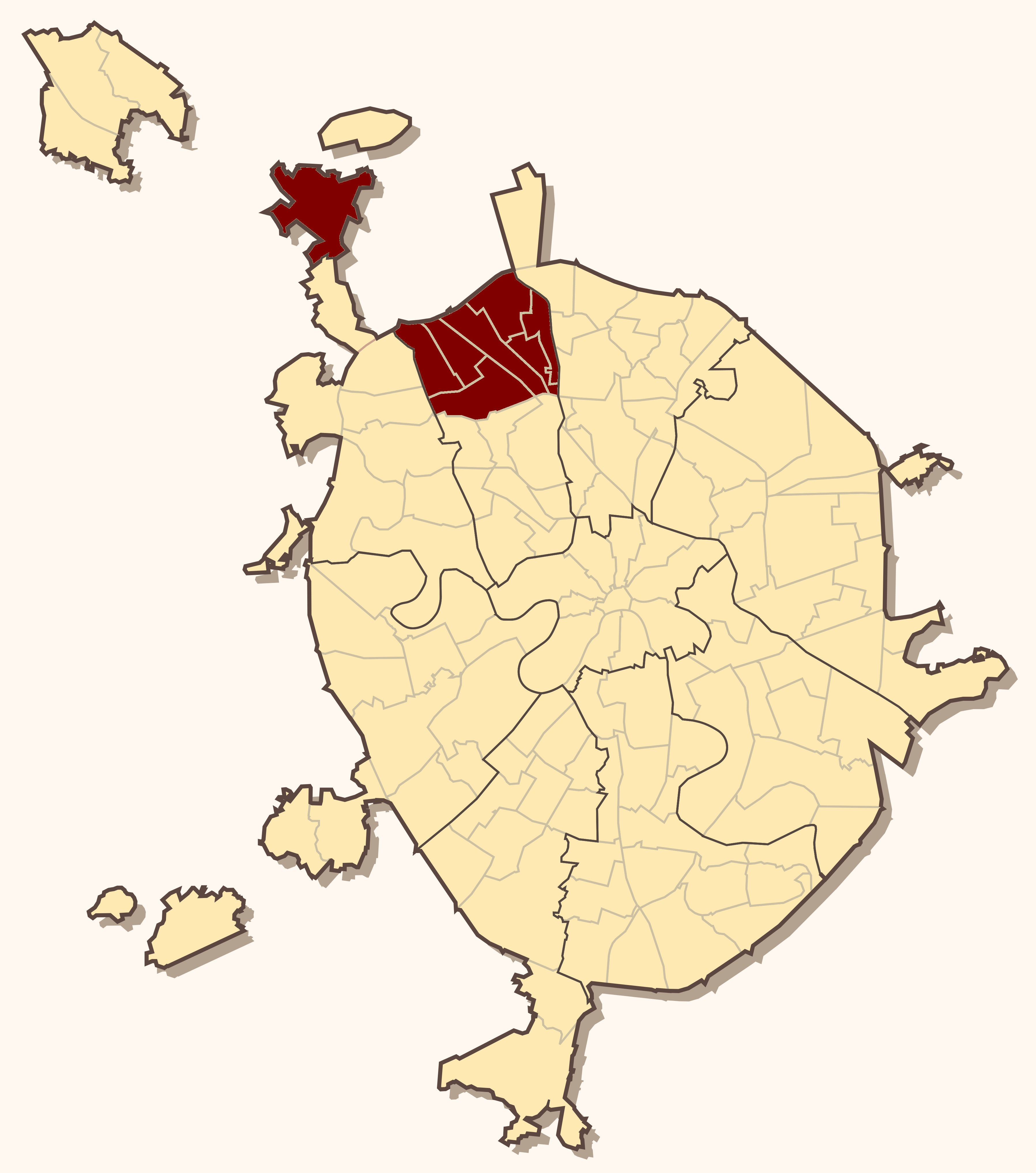 Карта Знаменского благочиннического округа